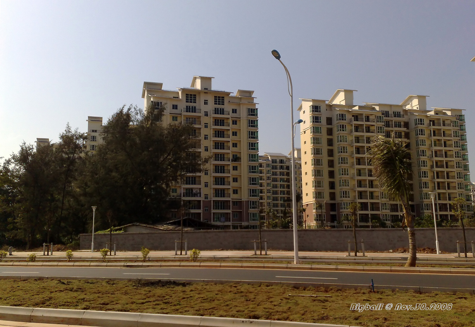 滨江路-By Bigball